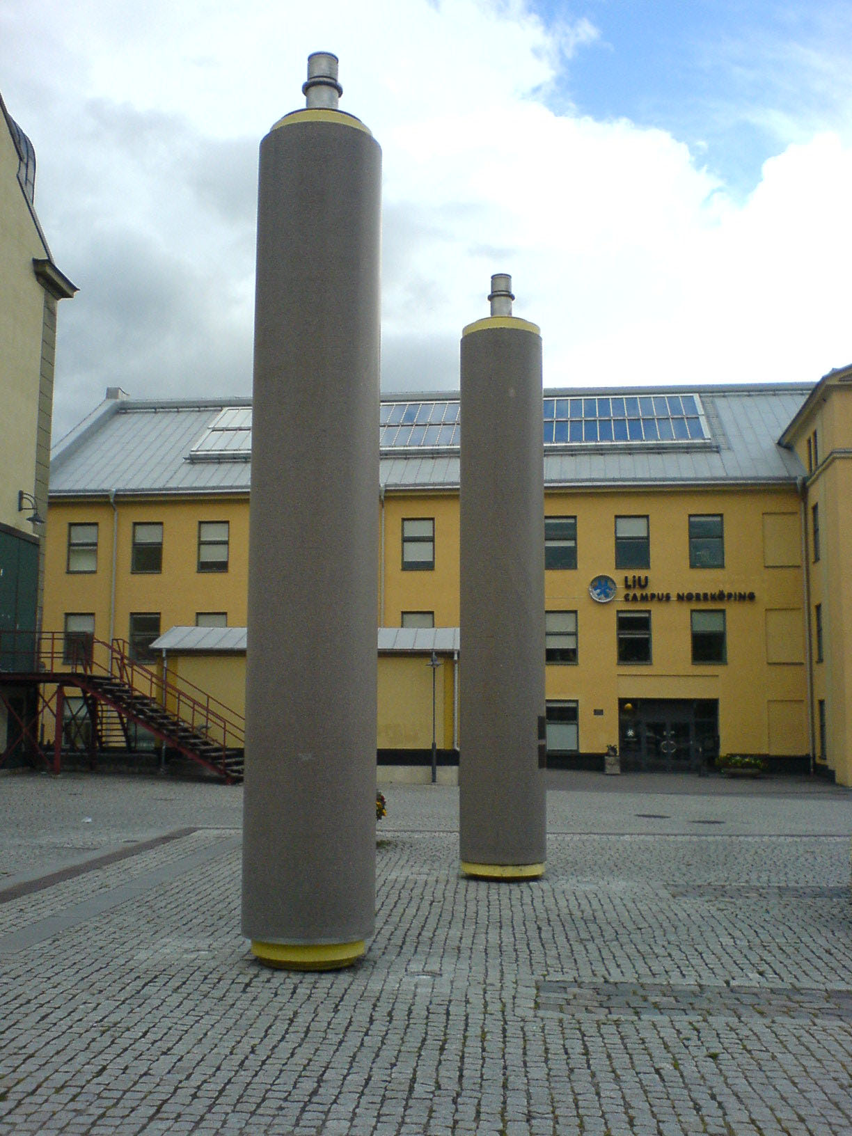 Holmentorget i Norrköping september 2007. Gamla pappersvalsar från Holmens bruk.